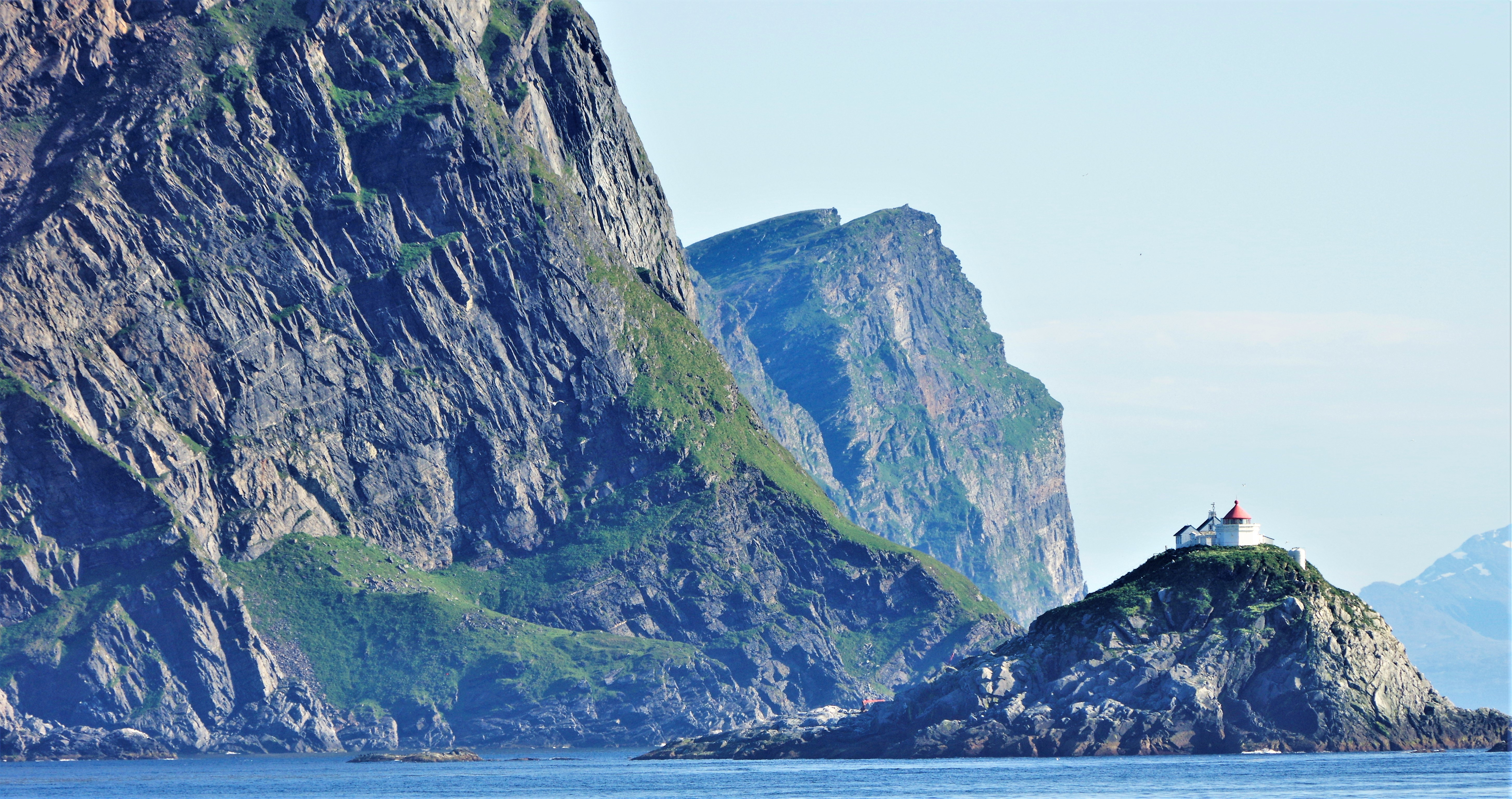 Fugløykalven fyr. Bilde tatt 17.juli 2018. Foto. Morten Willumsen